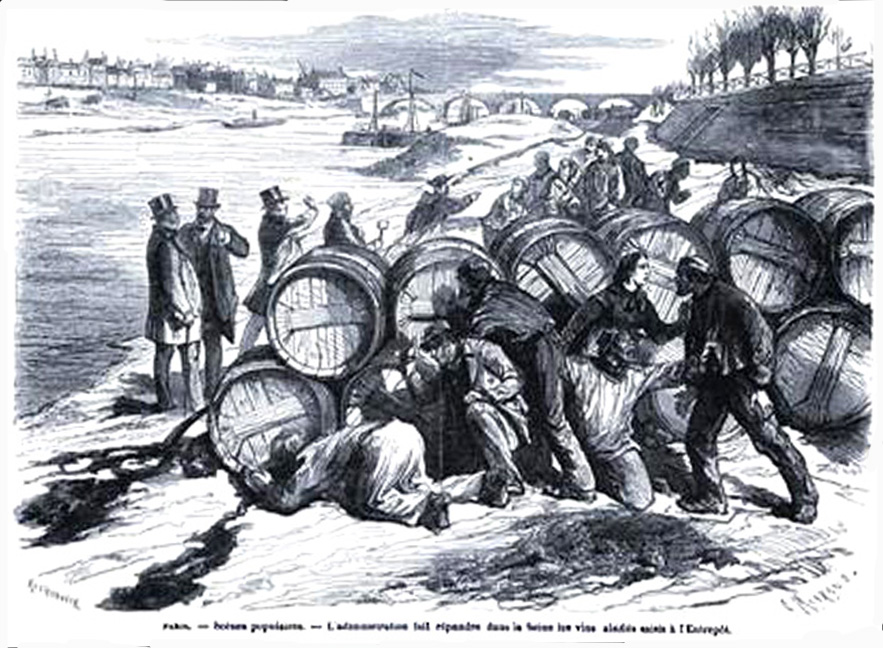 Répression des fraudes sur le vin en 1905